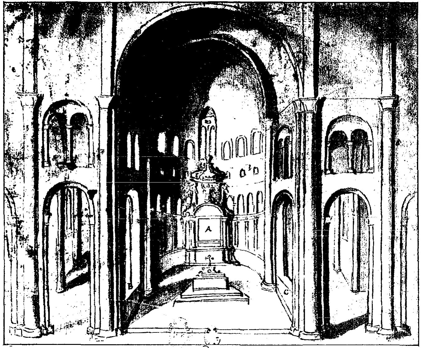 Reproduction d'un dessin du chevet de l'abbatiale Saint-Martial de Limoges